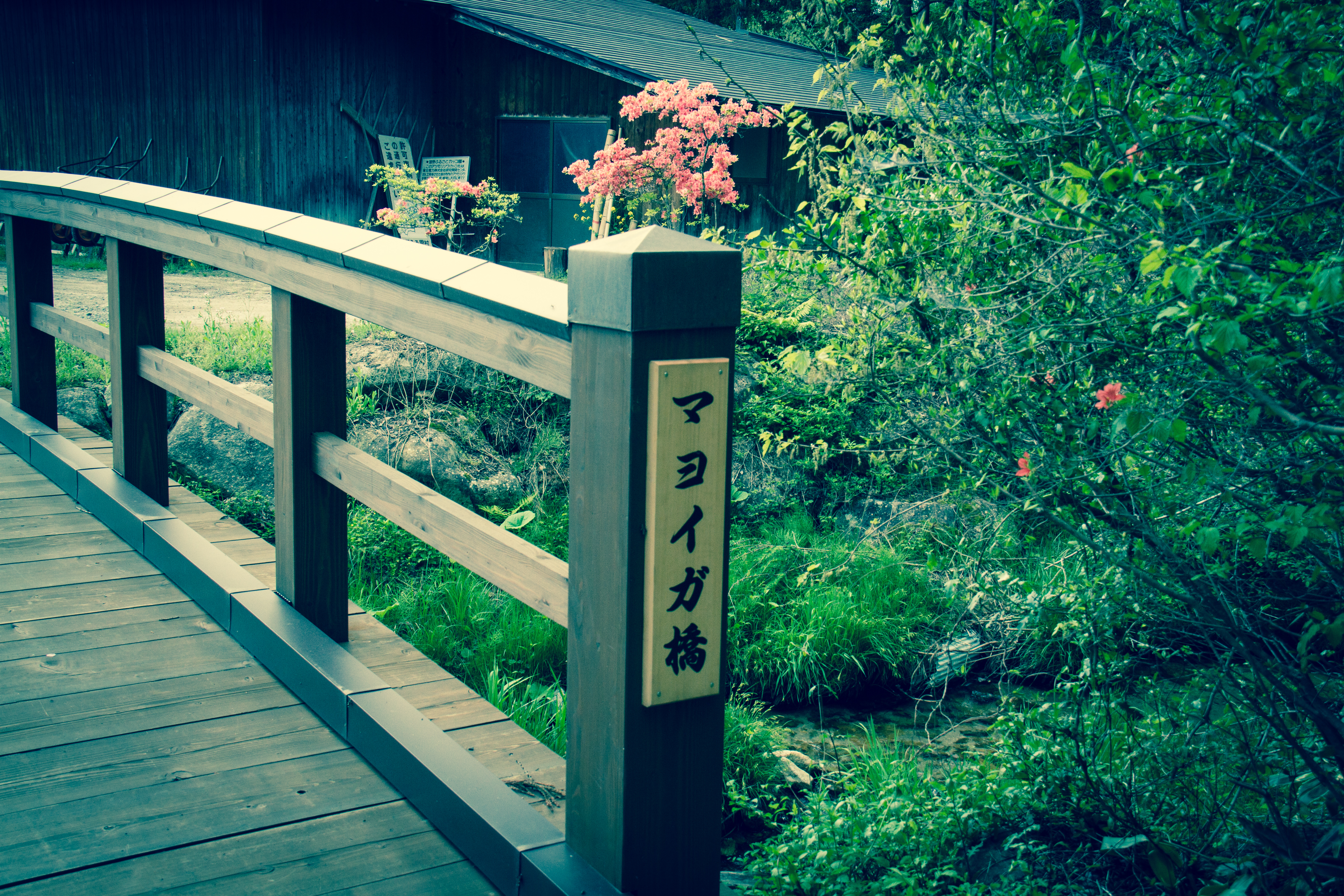 Mayoiga Bridge (マヨイガ橋)